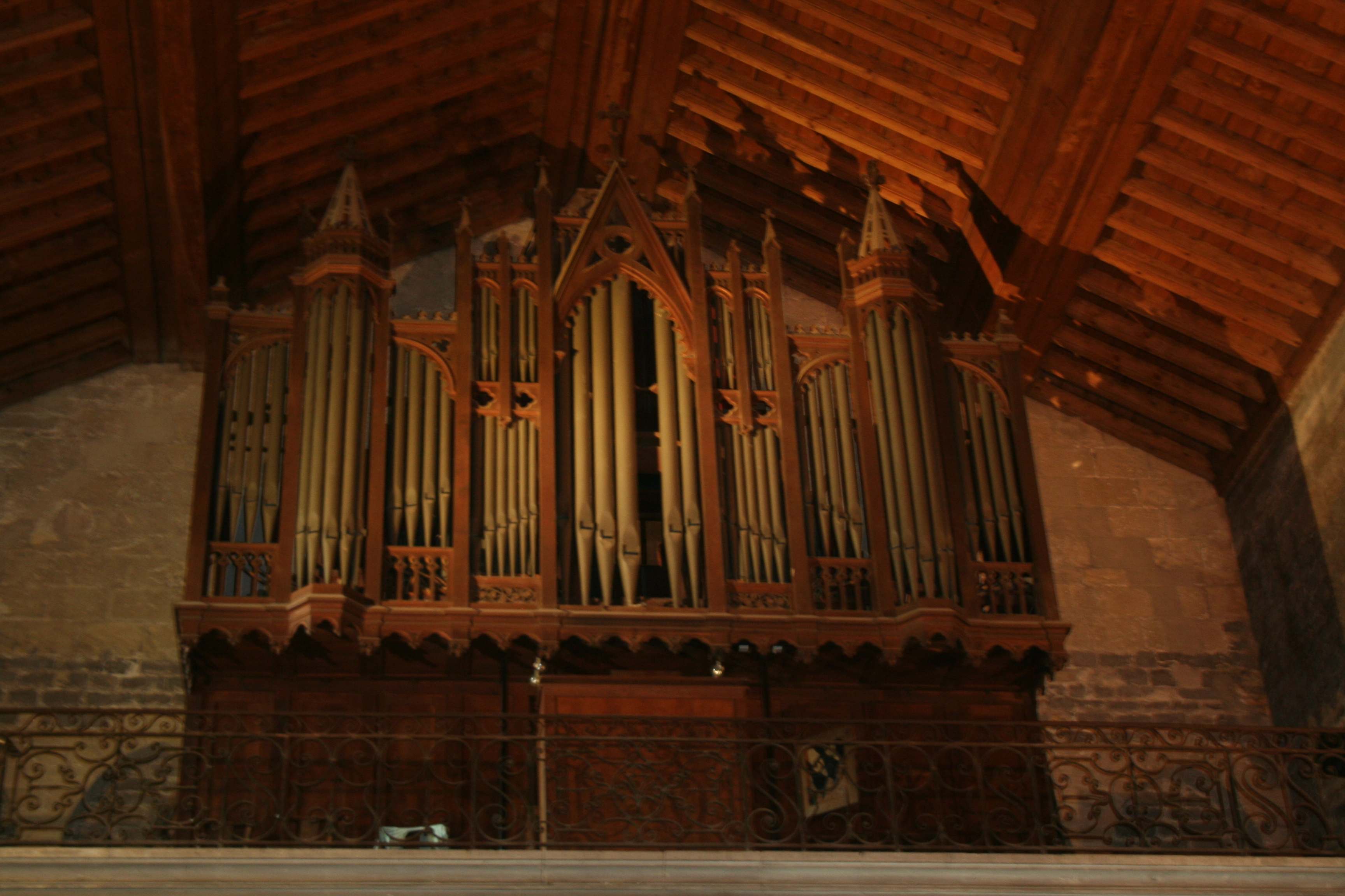 Frontignan (Hérault) - Église Saint-Paul - orgue Puget.